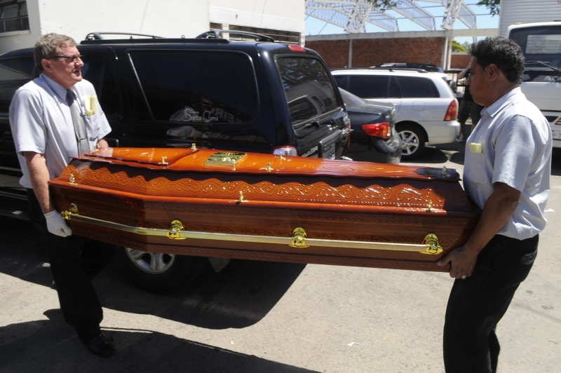 Caixões são levados para o Centro Desportivo Municipal onde estão sendo identificados os corpos das vítimas do incêndio na Boate Kiss.